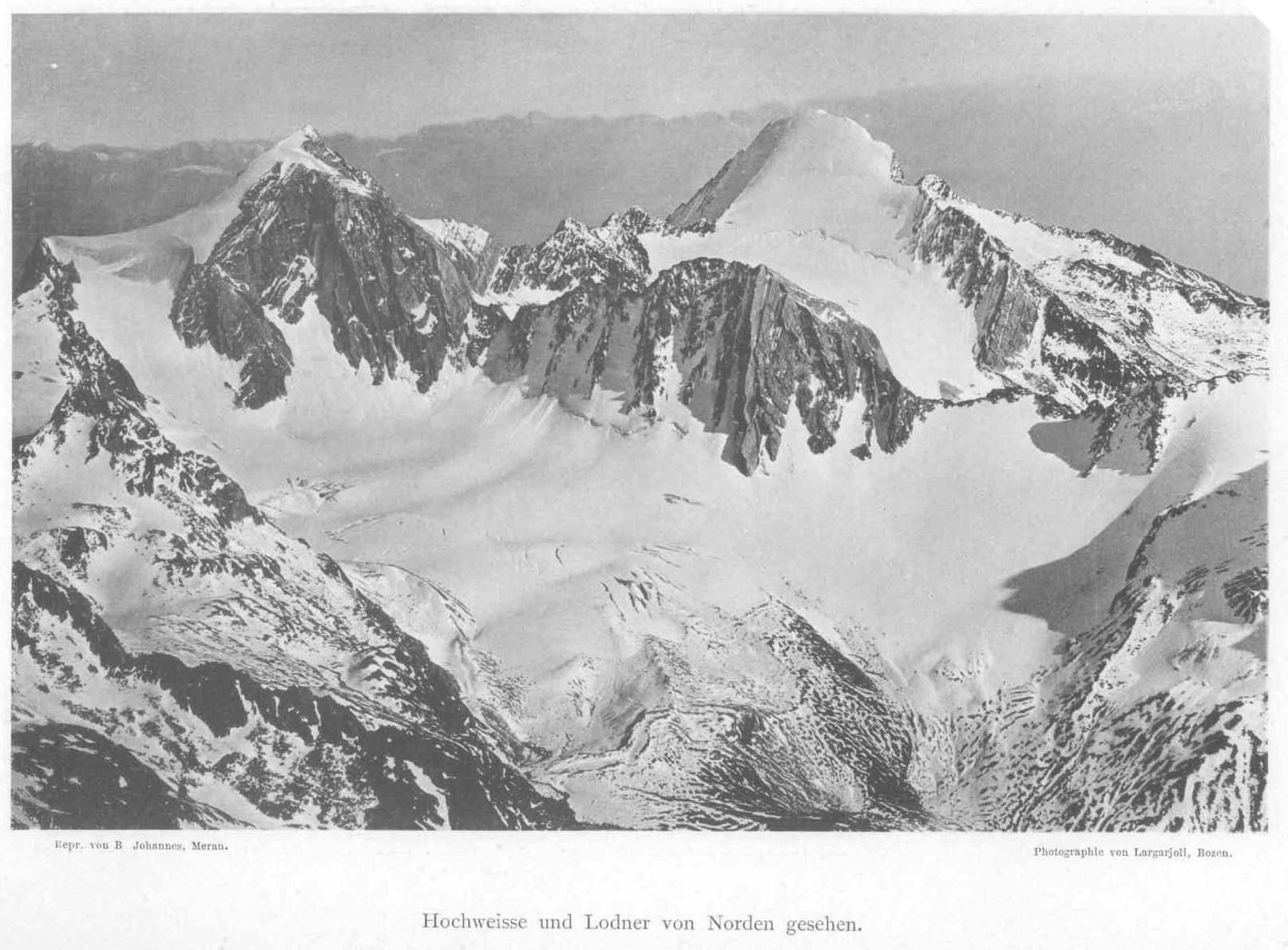 Hochweisse und Lodner, von Norden aus